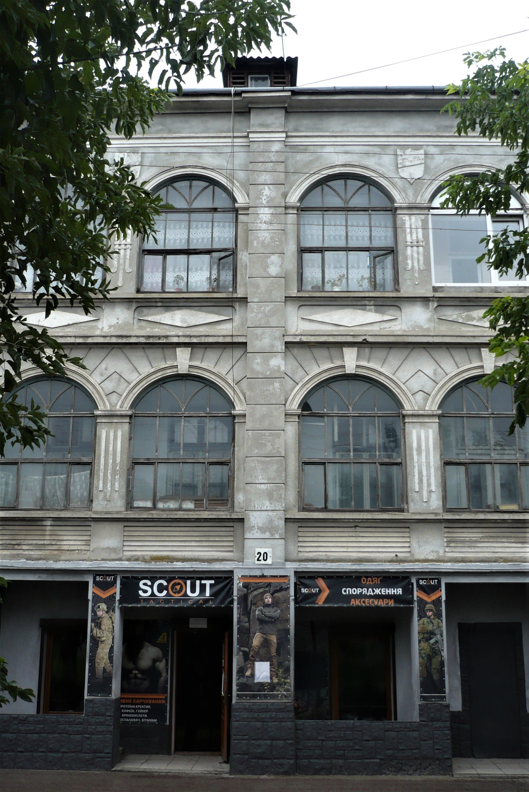 Kamienica w Złoczowie